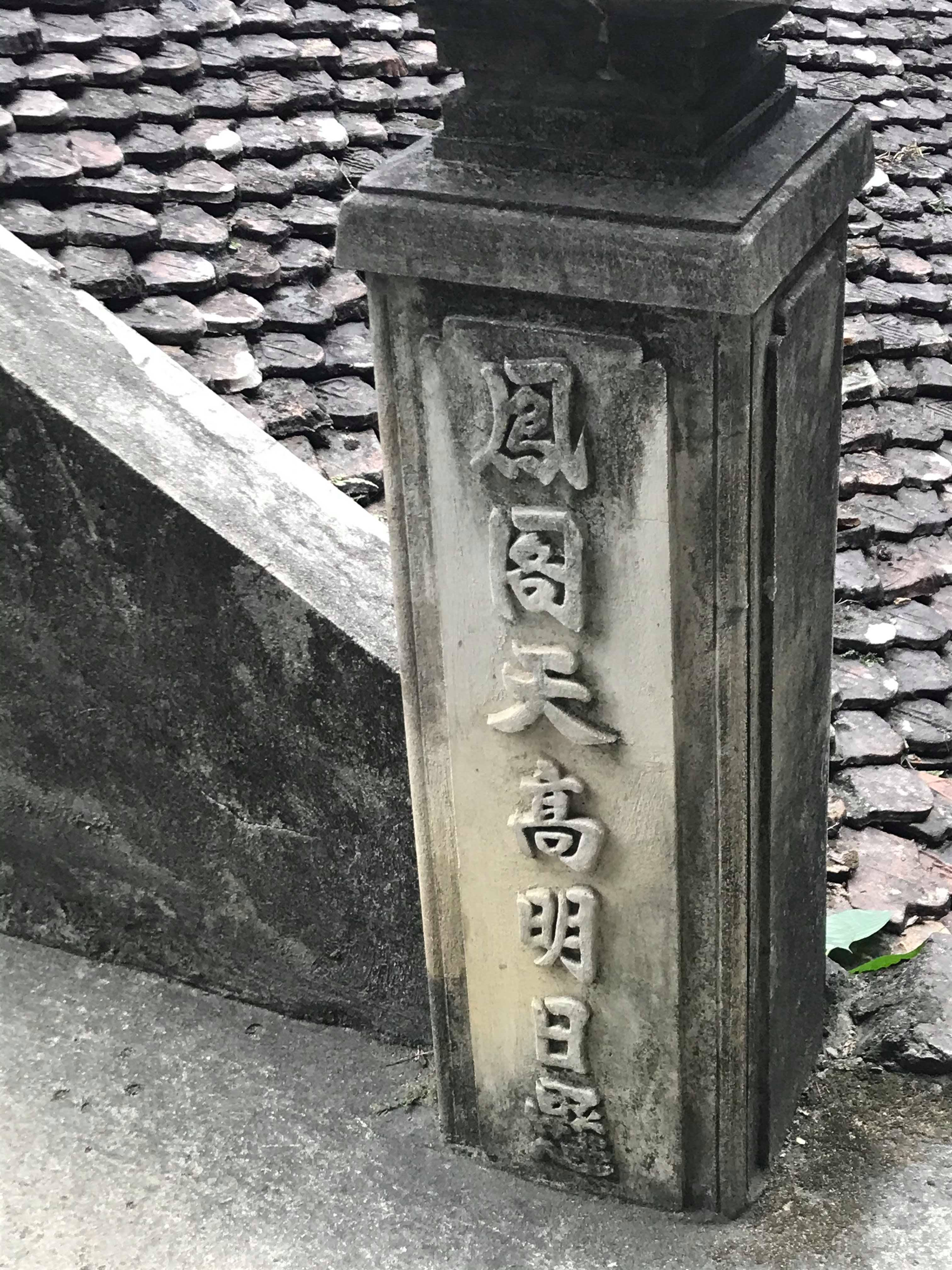 Phượng các thiên cao minh nhật ...